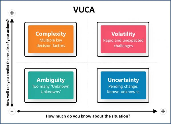 Қазақша (кирил): VUCA қисынсыздық, анықсыздық, айқынсыздық, түсініксіздік, күрделілік...